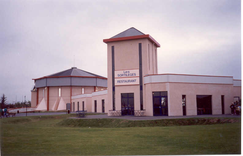 Restaurant Chez Leonardo